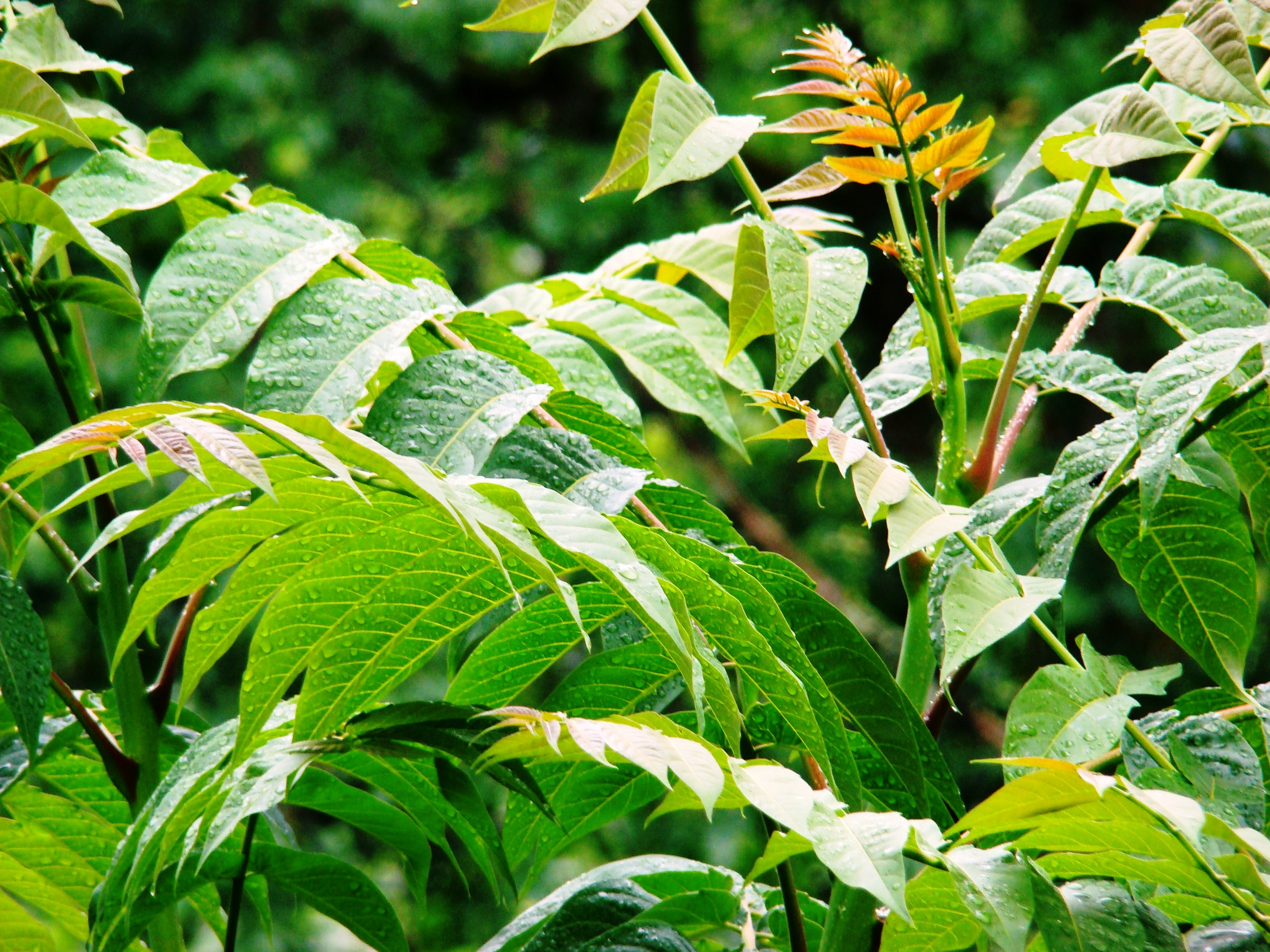 Kokarağaç (Ailanthus altissima)